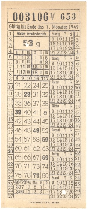 Strassenbahnfahrschein der Wiener Verkehrsbetriebe von 1949